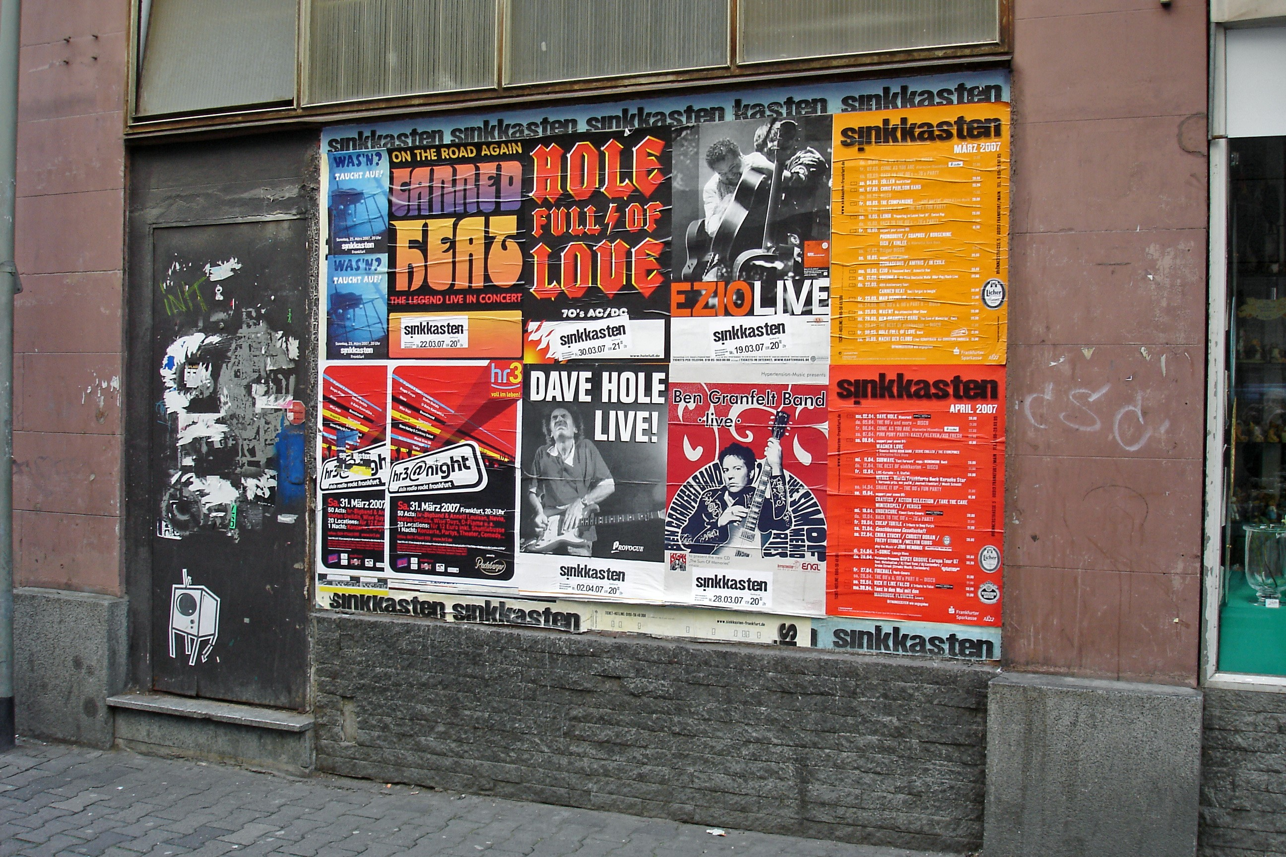 Plakatwand am "Sinkkasten" in der Brönnerstraße in Frankfurt am Main